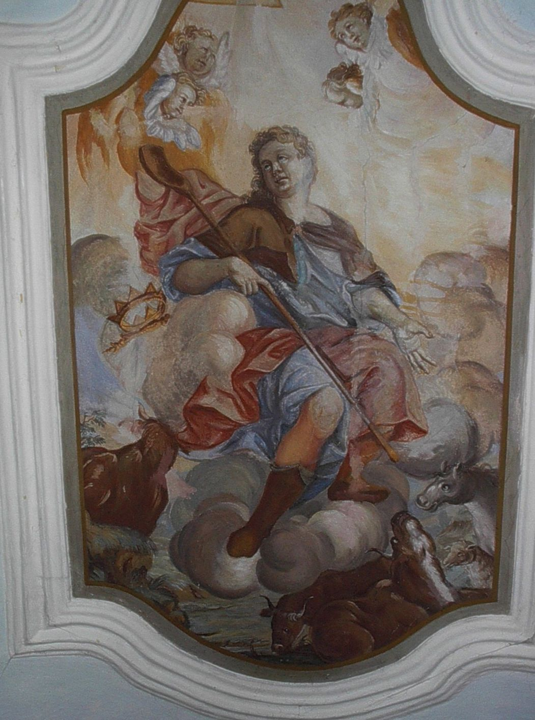 Das Deckengemälde der St. Wendelins-Kapelle in Feldkirchen